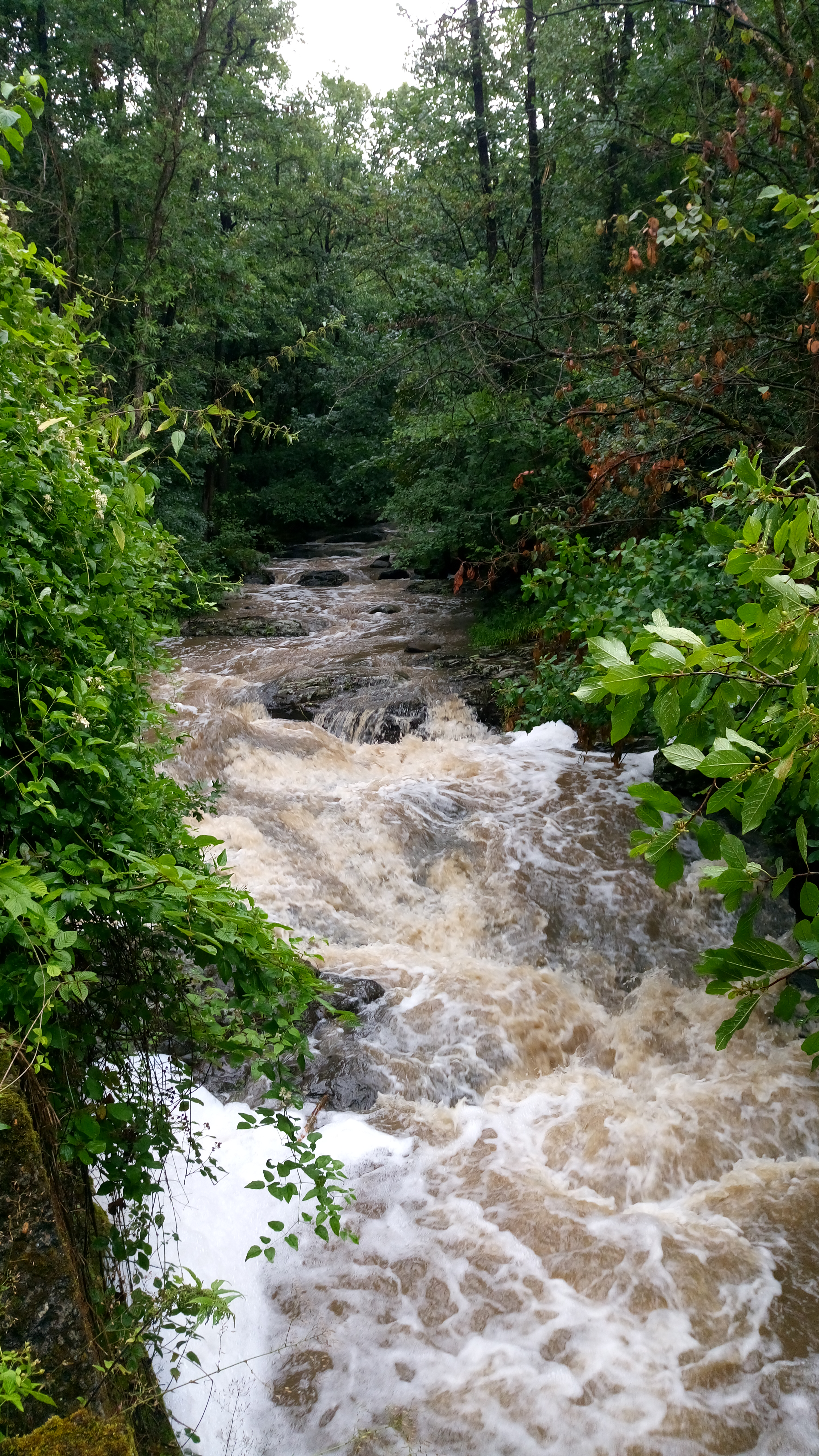 A vonat ablakából ilyen látvány tárul a szemünk elé. (Őrlőmű előtt)